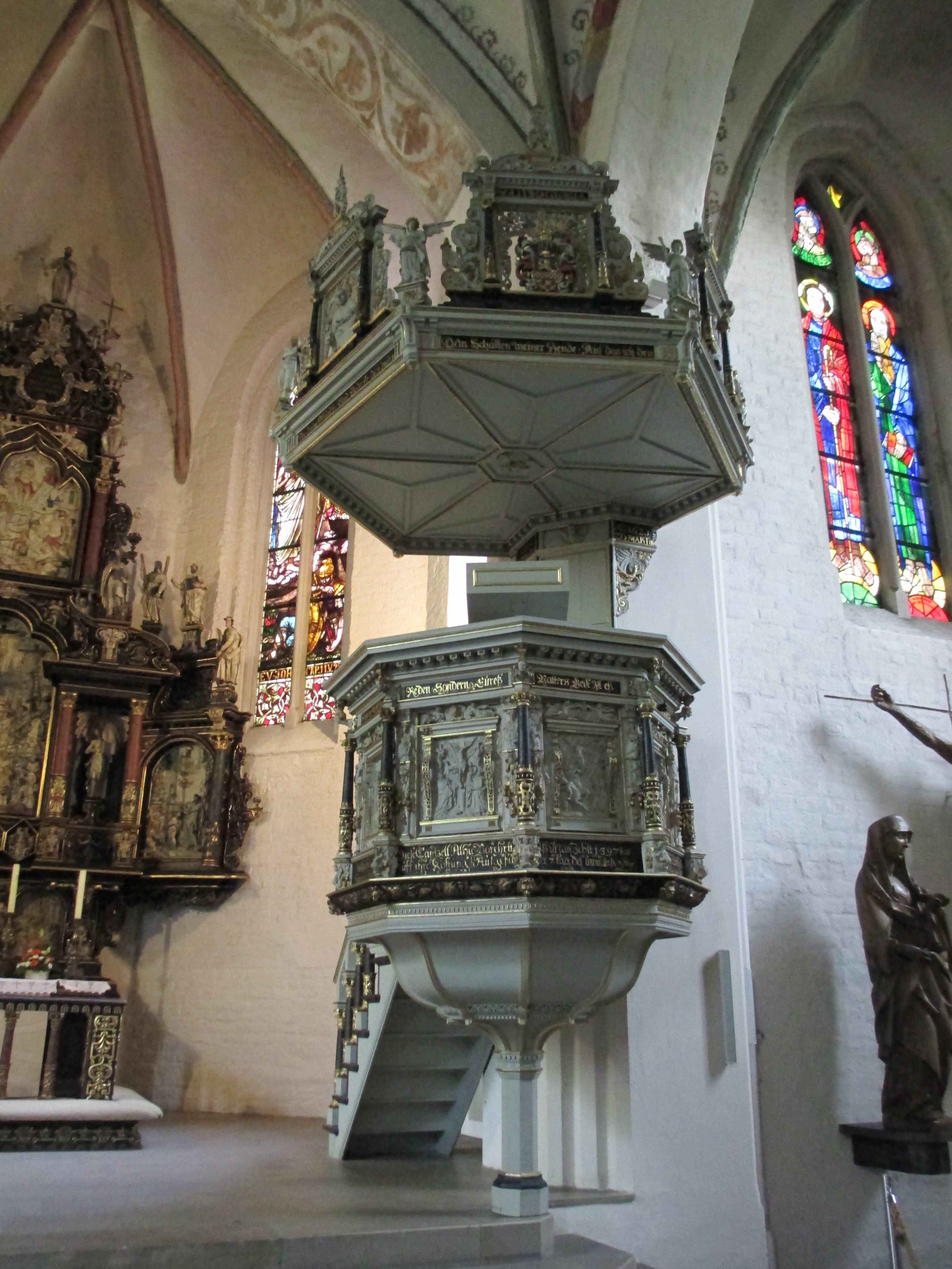 Rendsburg Marienkirche Kanzel (1621)